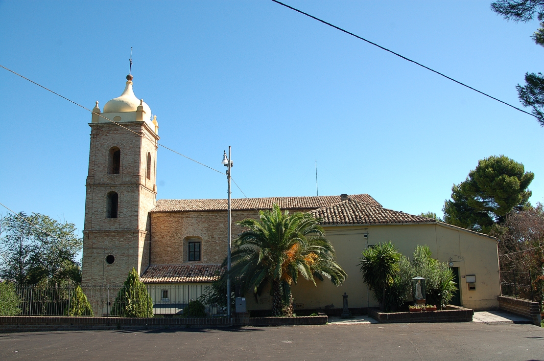 Pescara